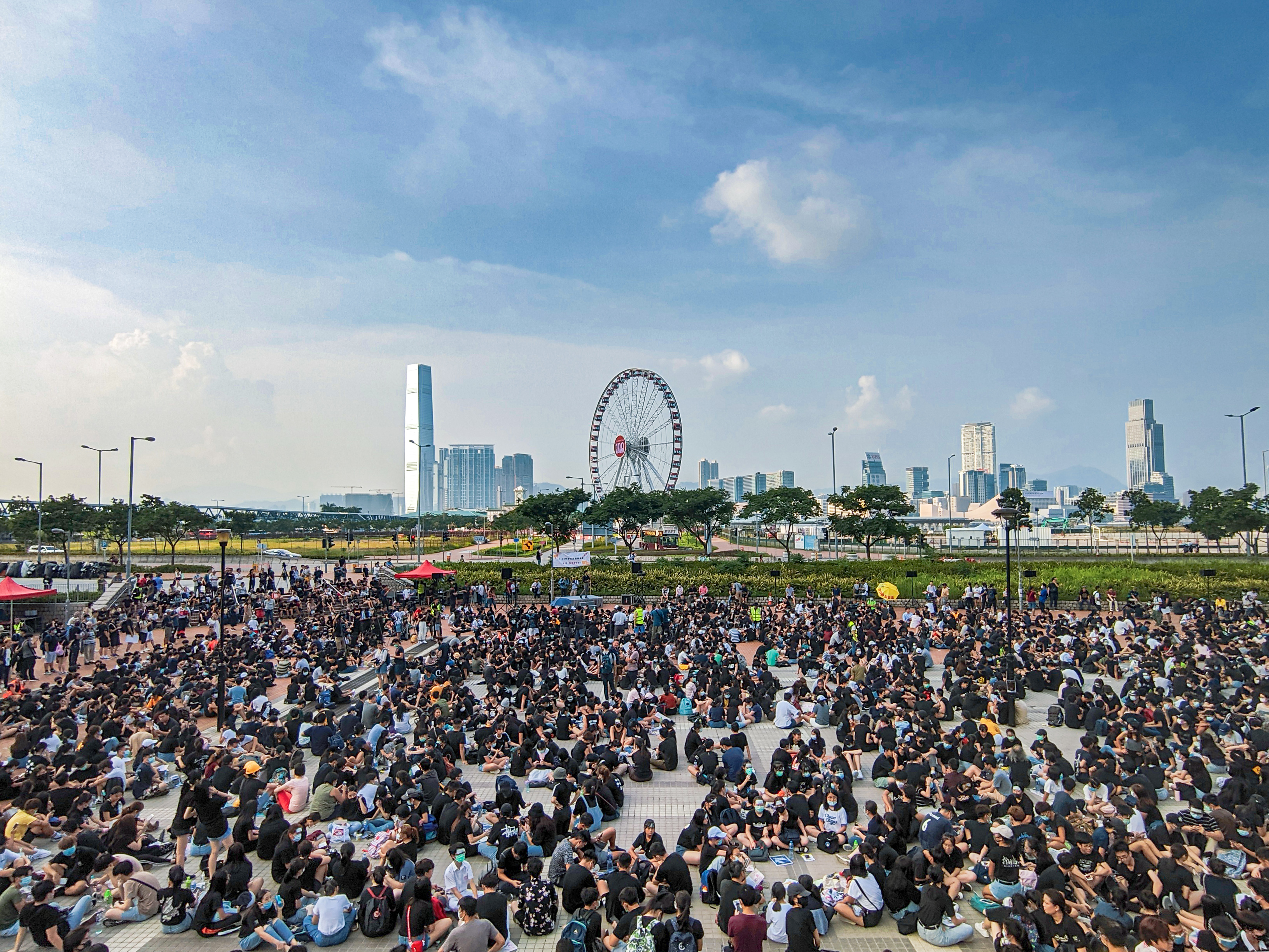 IMG_20190822_165124